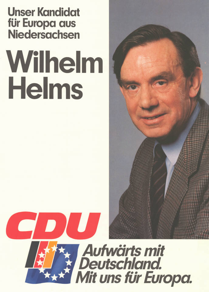 Unser Kandidat für Europa aus Niedersachsen Wilhelm Helms CDU Aufwärts mit Deutschland. Mit uns für Europa. Abbildung: Porträtfoto Plakatart: Kandidaten-/Personenplakat mit Porträt Objekt-Signatur: 10-030 : 169 Bestand: Europawahlplakate (10-030) GliederungBestand10-18: Europawahlplakate (10-030) » Europawahl am 17.6.1984 » CDU Lizenz: KAS/ACDP 10-030 : 169 CC-BY-SA 3.0 DE